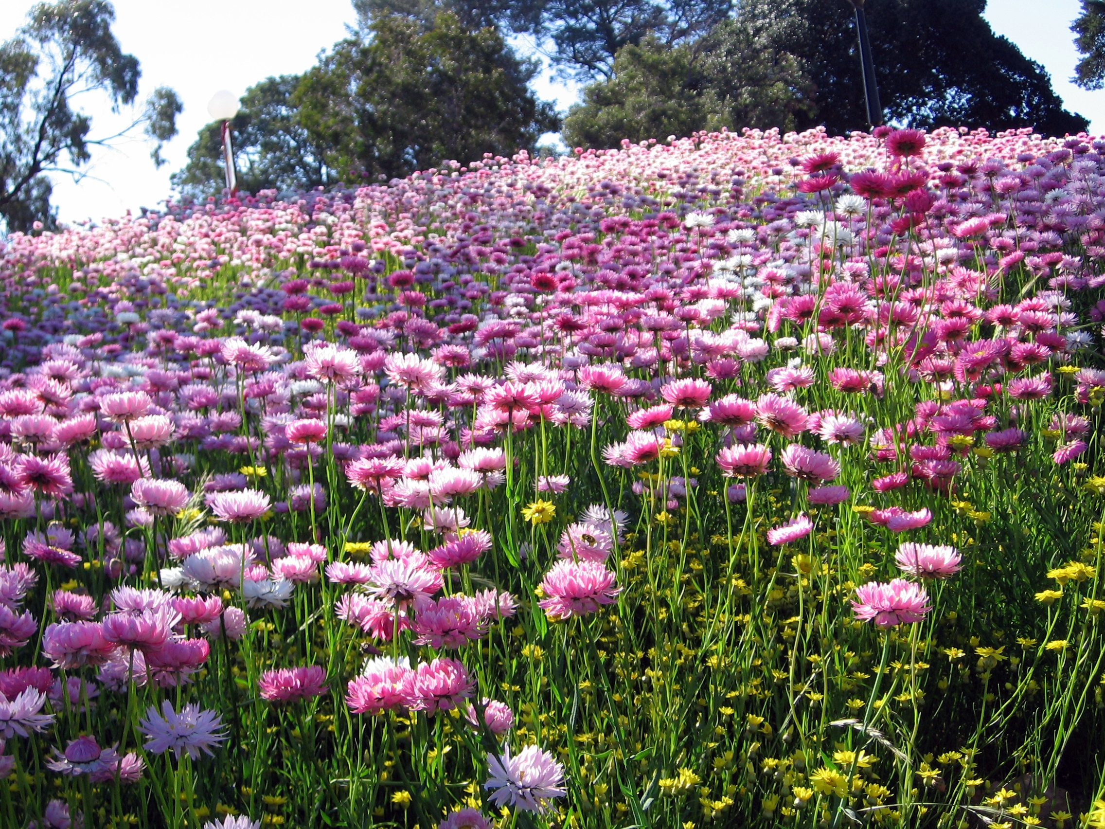 Everlasting daisies in Kings Park, Perth, Western Australia.